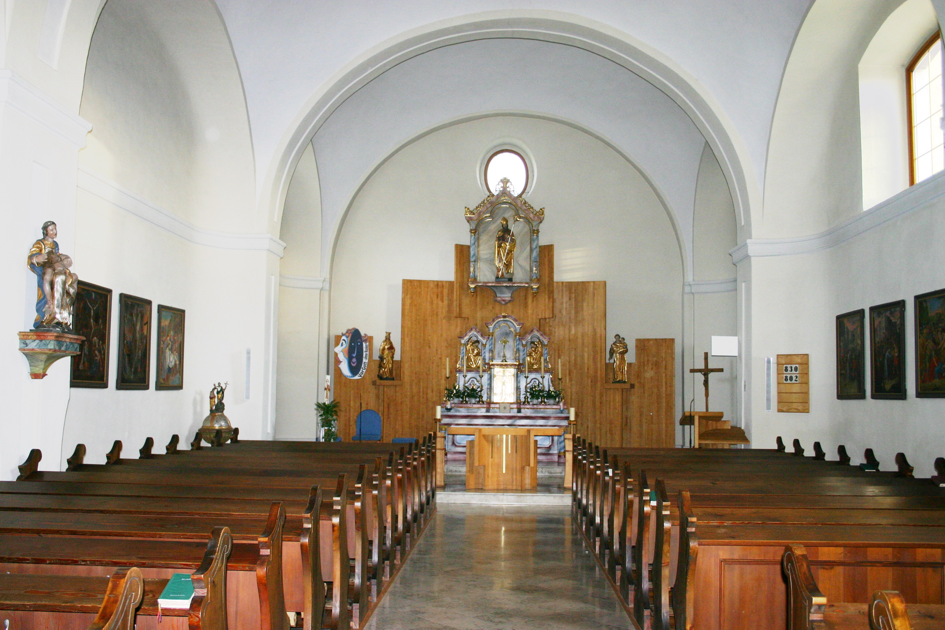 Gerersdorf-Sulz Innenansicht der römisch-katholischen Pfarrkirche in Gerersdorf